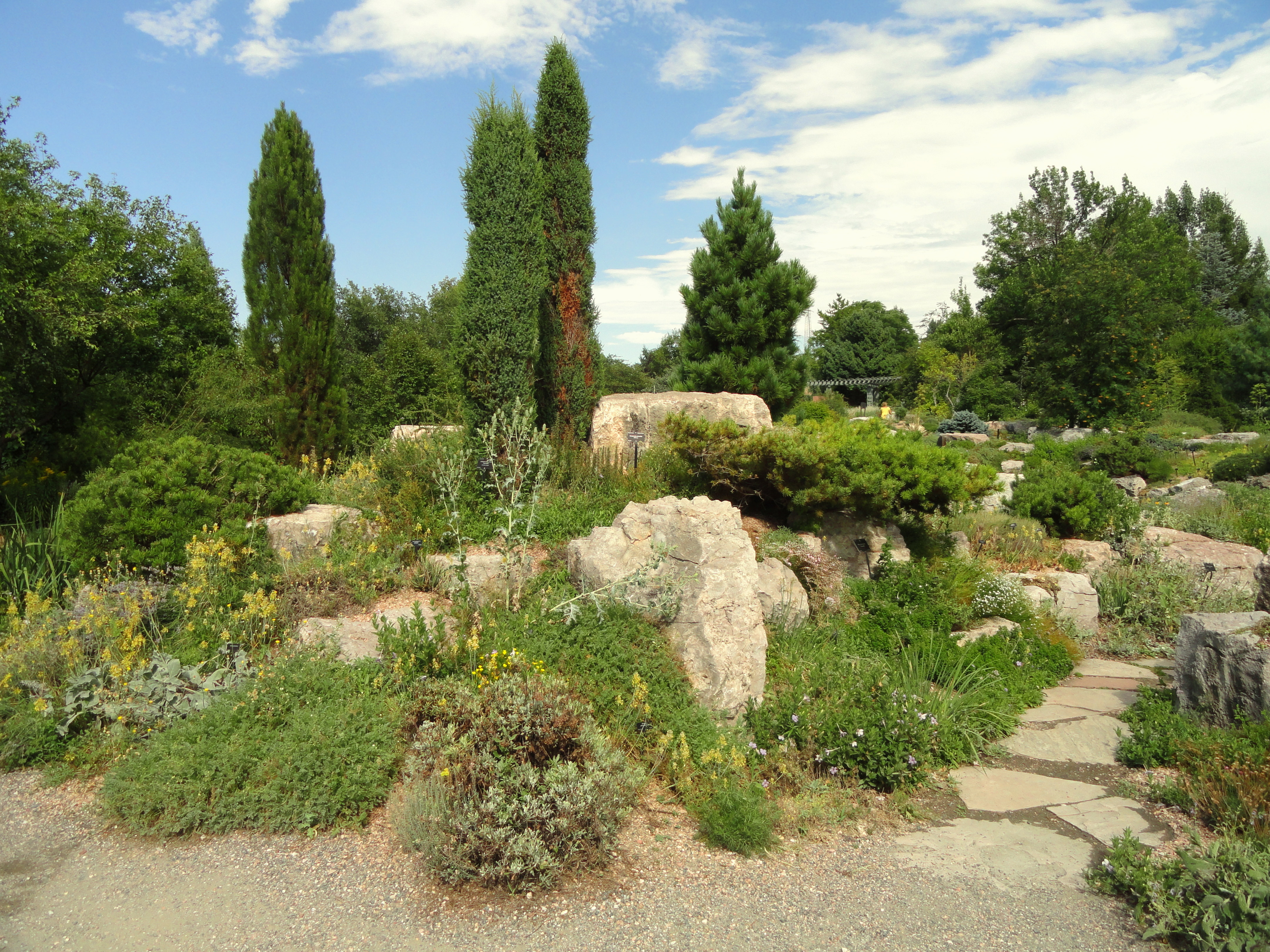 Rock Alpine Garden at Denver Botanic Gardens, 1007 York Street, Denver, Colorado, USA.